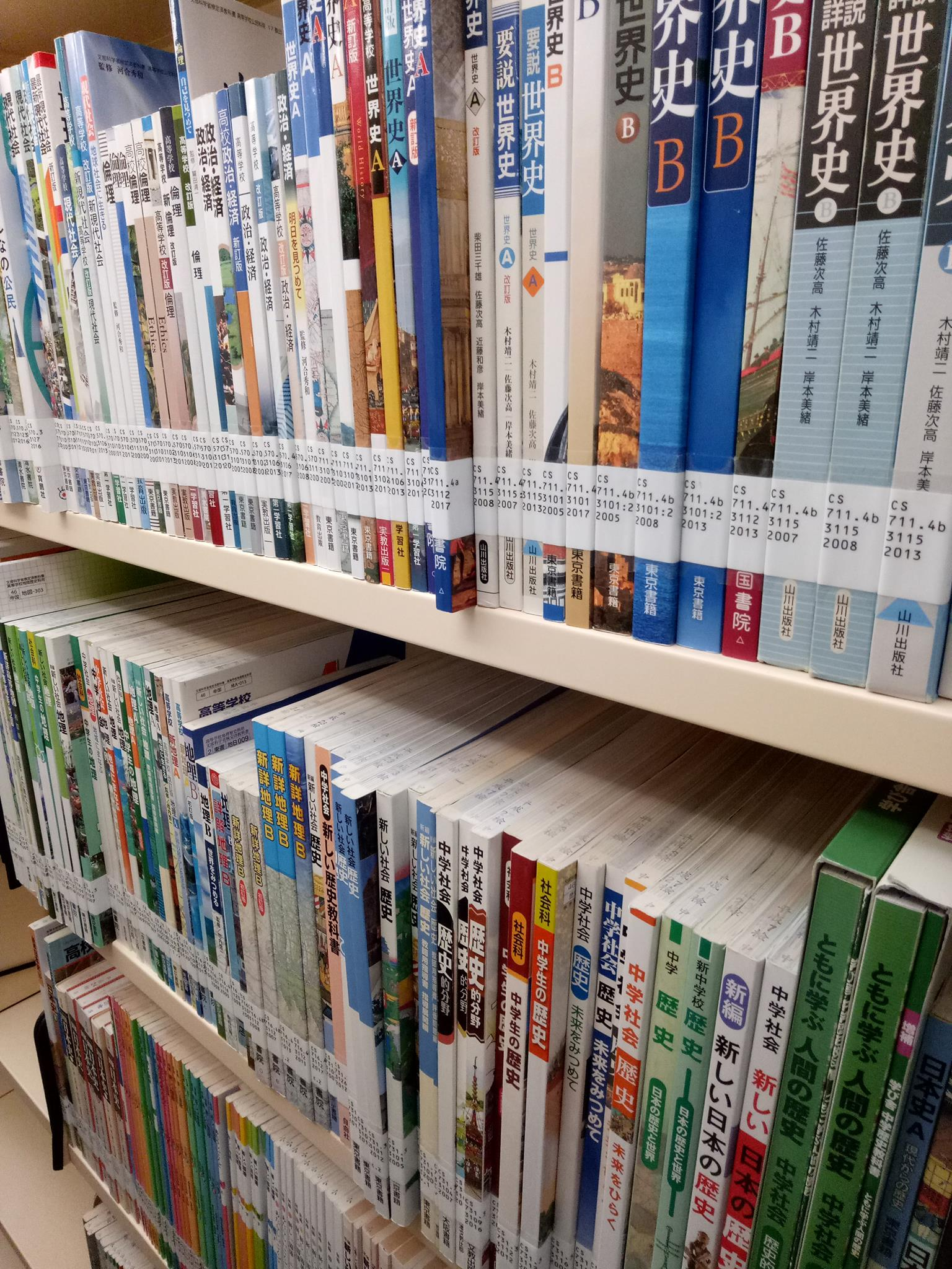 國家教育研究院教科書圖書館館藏 日本教科奢